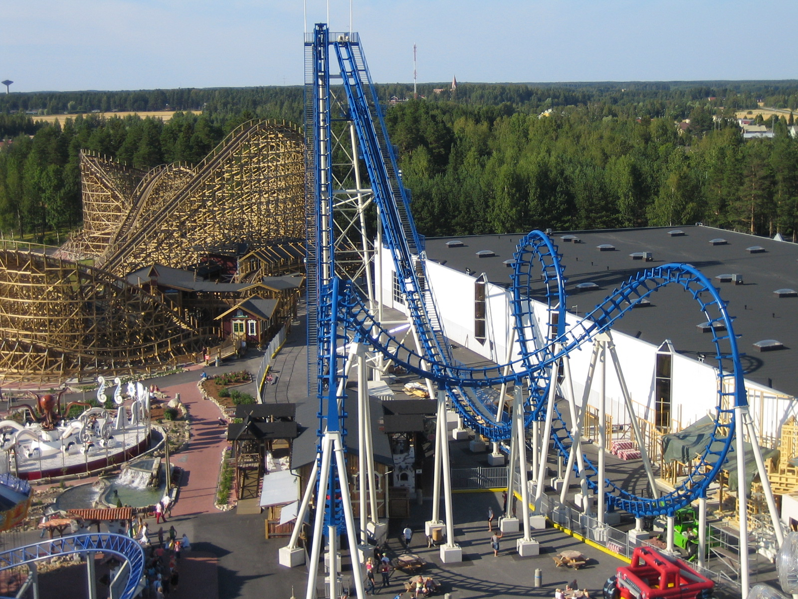 PowerParkin Cobra-vuoristorata